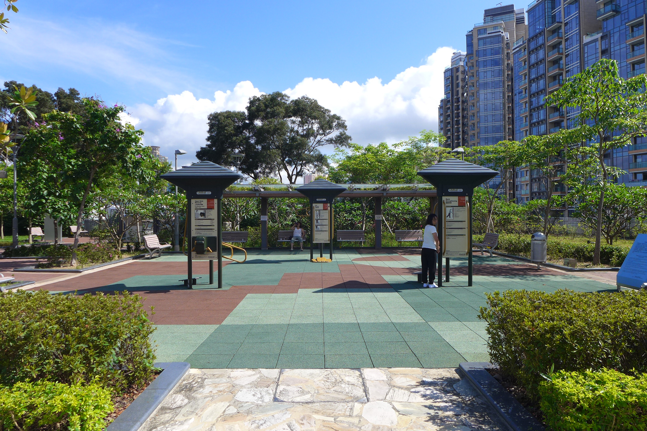 Chung Yee Street Garden Fitness station